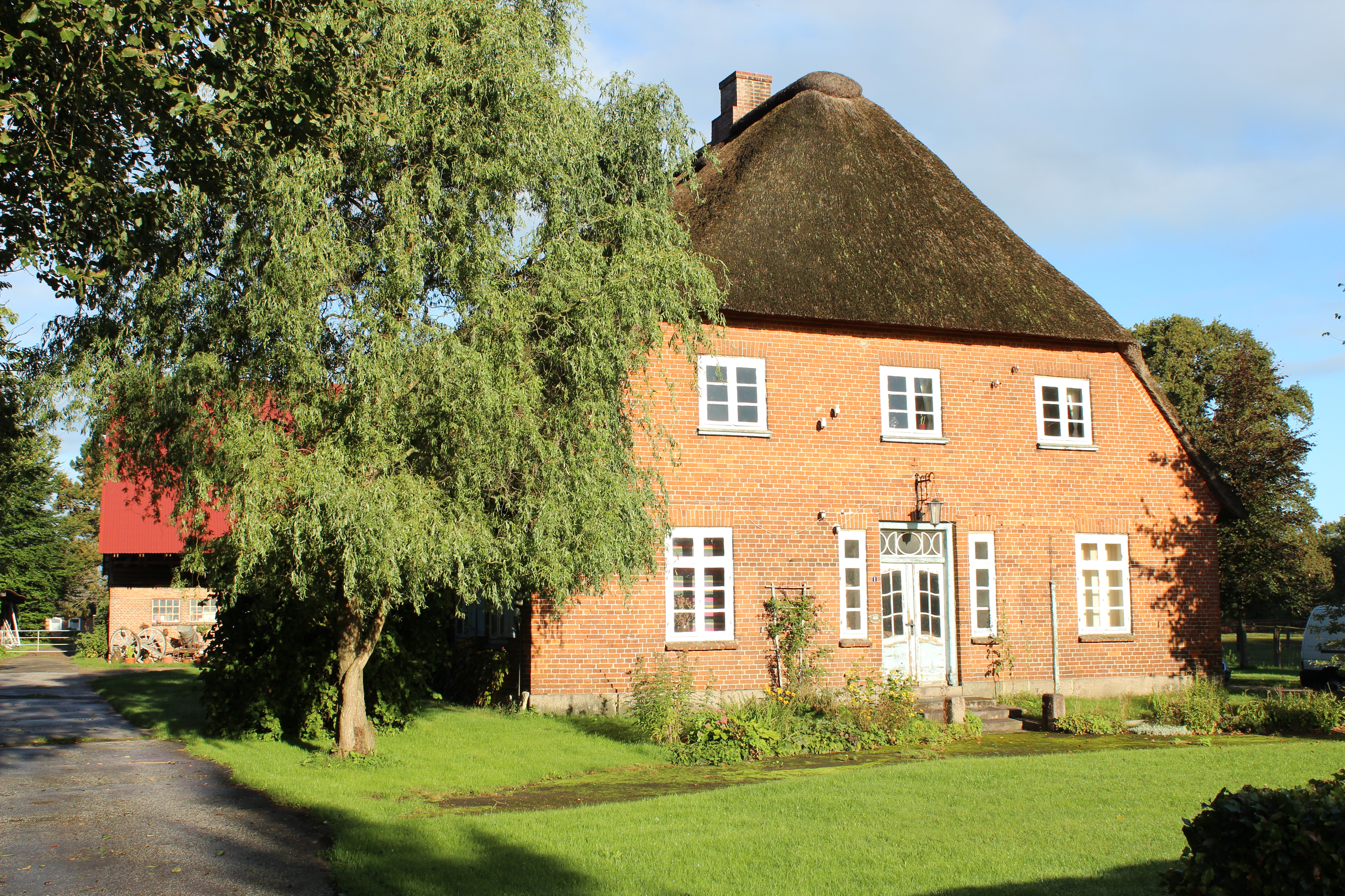 Schleswig-Holstein, Warder, Ortsteil Altmühlendorf, Hauptstrasse 1, Wohnhaus (ehem. Gasthof)